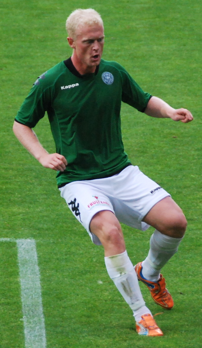 Fodboldspilleren Ken Fagerberg fra Viborg FF. Her i 1. divisionskampen mod FC Roskilde på Viborg Stadion.